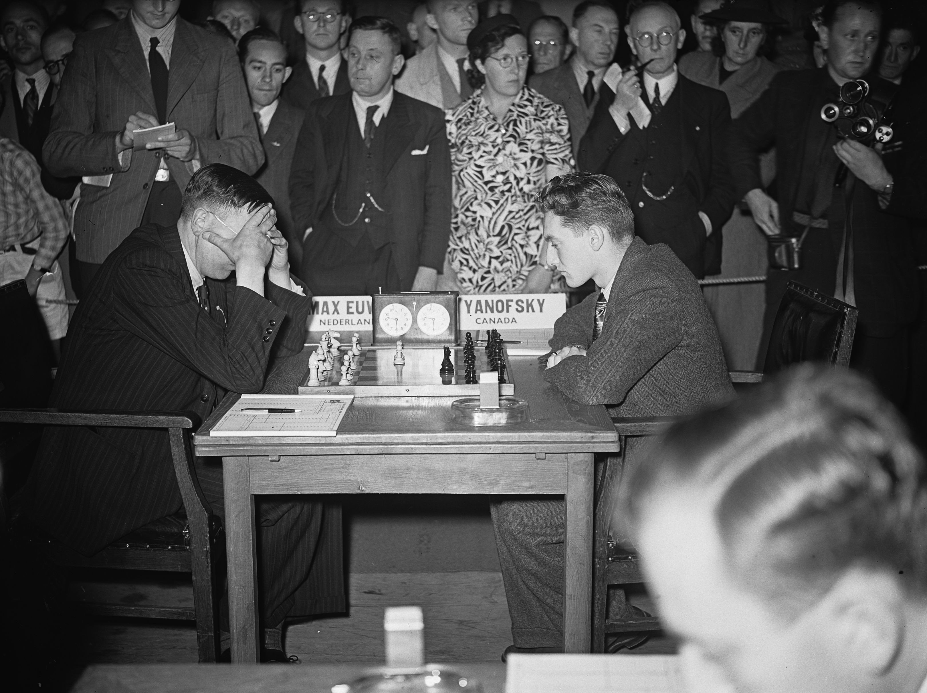 Collectie / Archief : Fotocollectie Anefo Reportage / Serie : [ onbekend ] Beschrijving : Wereldschaaktoernooi ontvangst gemeentebestuur Datum : 12 augustus 1946 Trefwoorden : Ontvangsten, gemeentebesturen Fotograaf : Fotograaf Onbekend / Anefo Auteursrechthebbende : Nationaal Archief Materiaalsoort : Glasnegatief Nummer archiefinventaris : bekijk toegang 2.24.01.09 Bestanddeelnummer : 901-8910